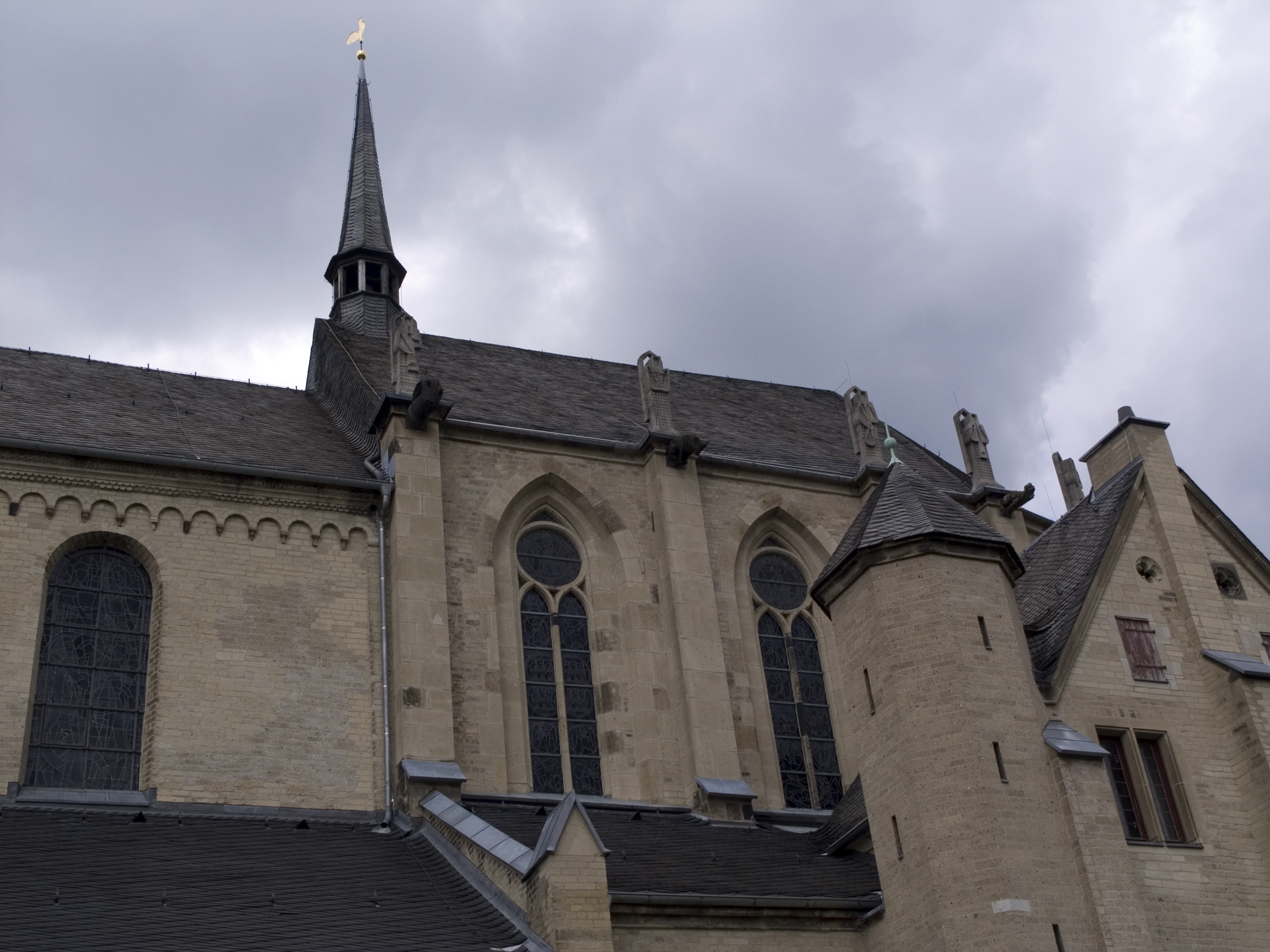 Северный Рейн-Вестфалия, Мёнхенгладбах - Базилика Святого Вита